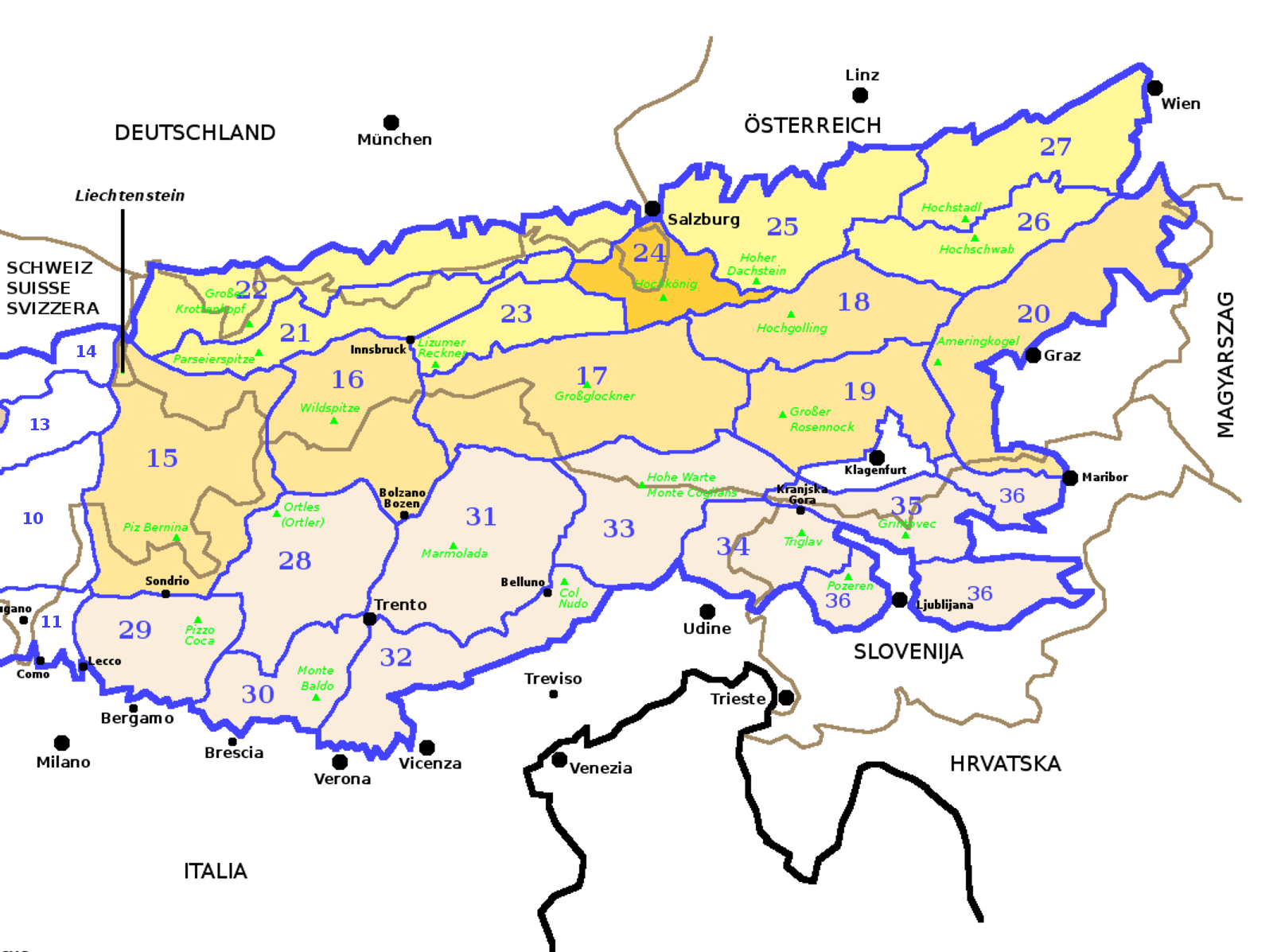 Alpi Orientali secondo la SOIUSA con evidenziate le Alpi Settentrionali Salisburghesi